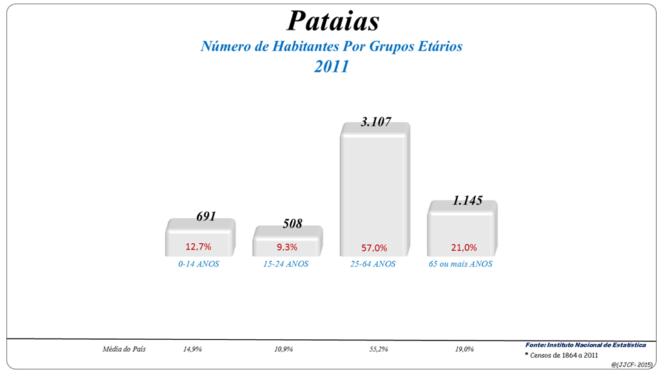 População